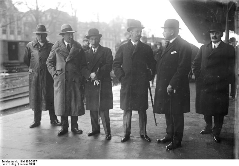 Zur Eröffnung der zweiten Haager Conferenz! ( Neueste Aufnamhnen unseres nach dort entsandten Sonder-Bildberichterstatters) Ankunft der ungarischen Deligation auf dem Bahnhof im Haag. ( In der Mitte in Unterhaltung) der ungarische Deligationsführer Graf Bethlen.